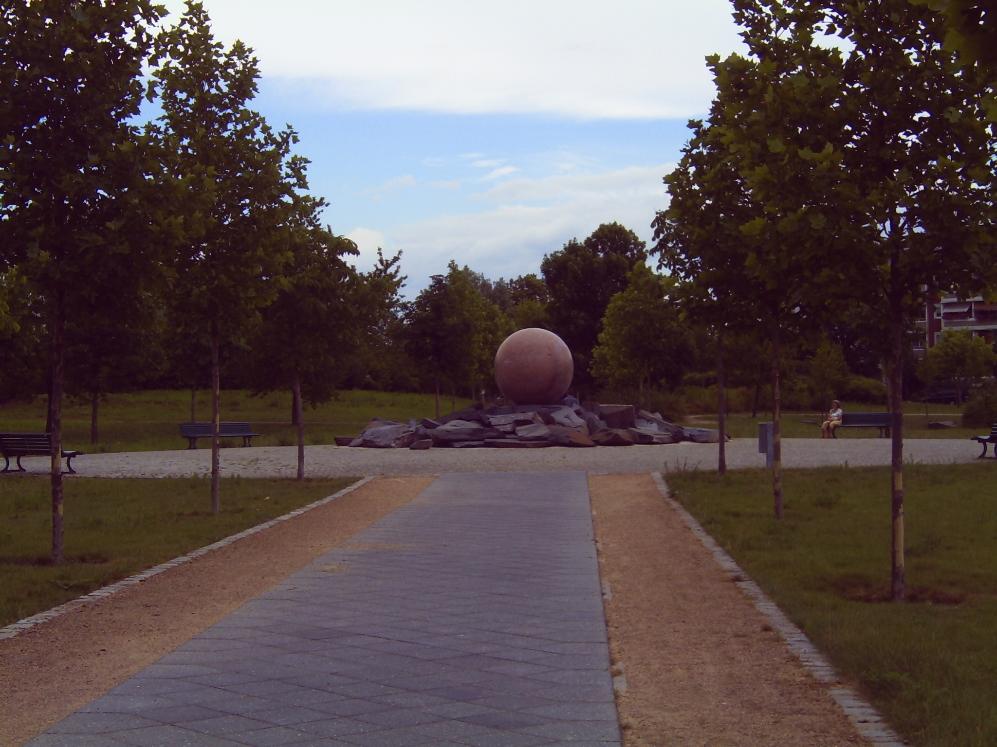 Große Marmorkugel im Gubener Park